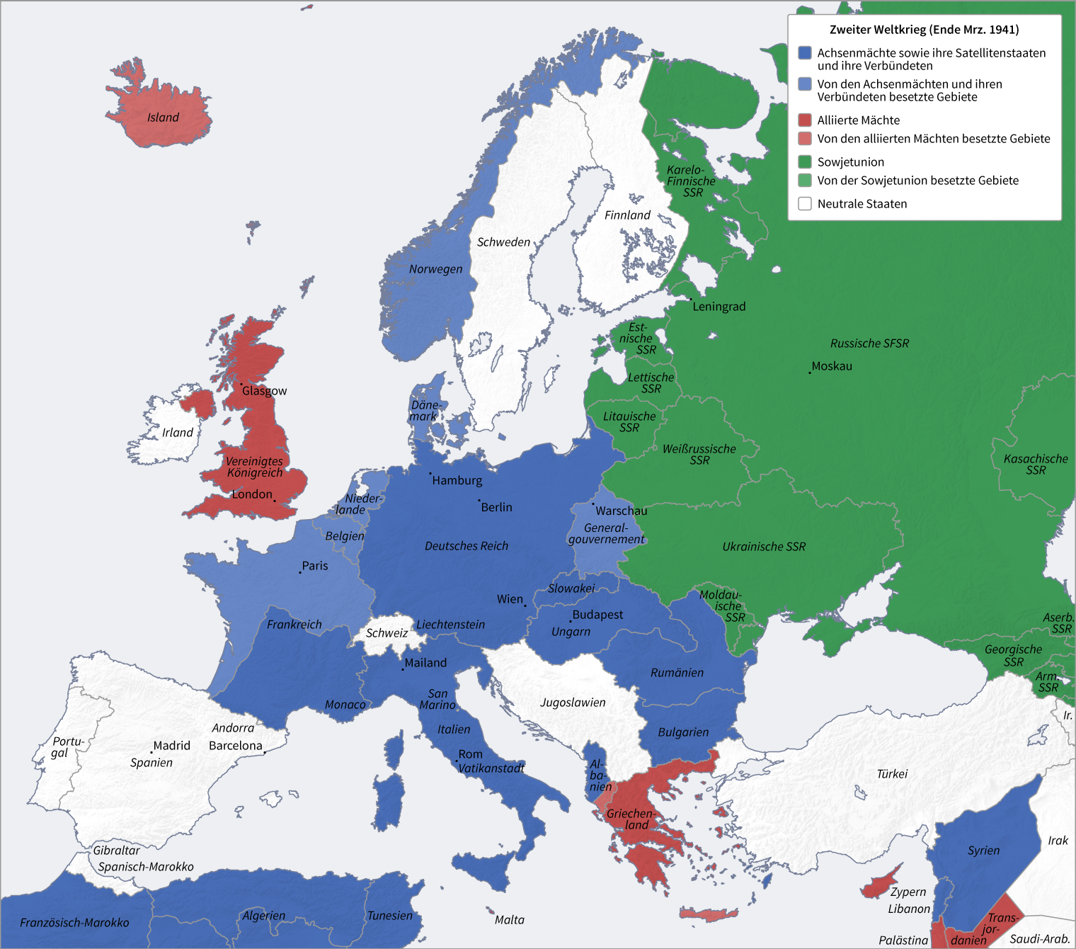 Zweiter Weltkrieg (Ende Mrz. 1941)